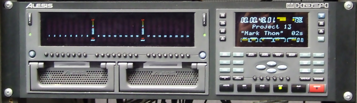 Grabador Multipista Digital de disco duro Alesis HD24